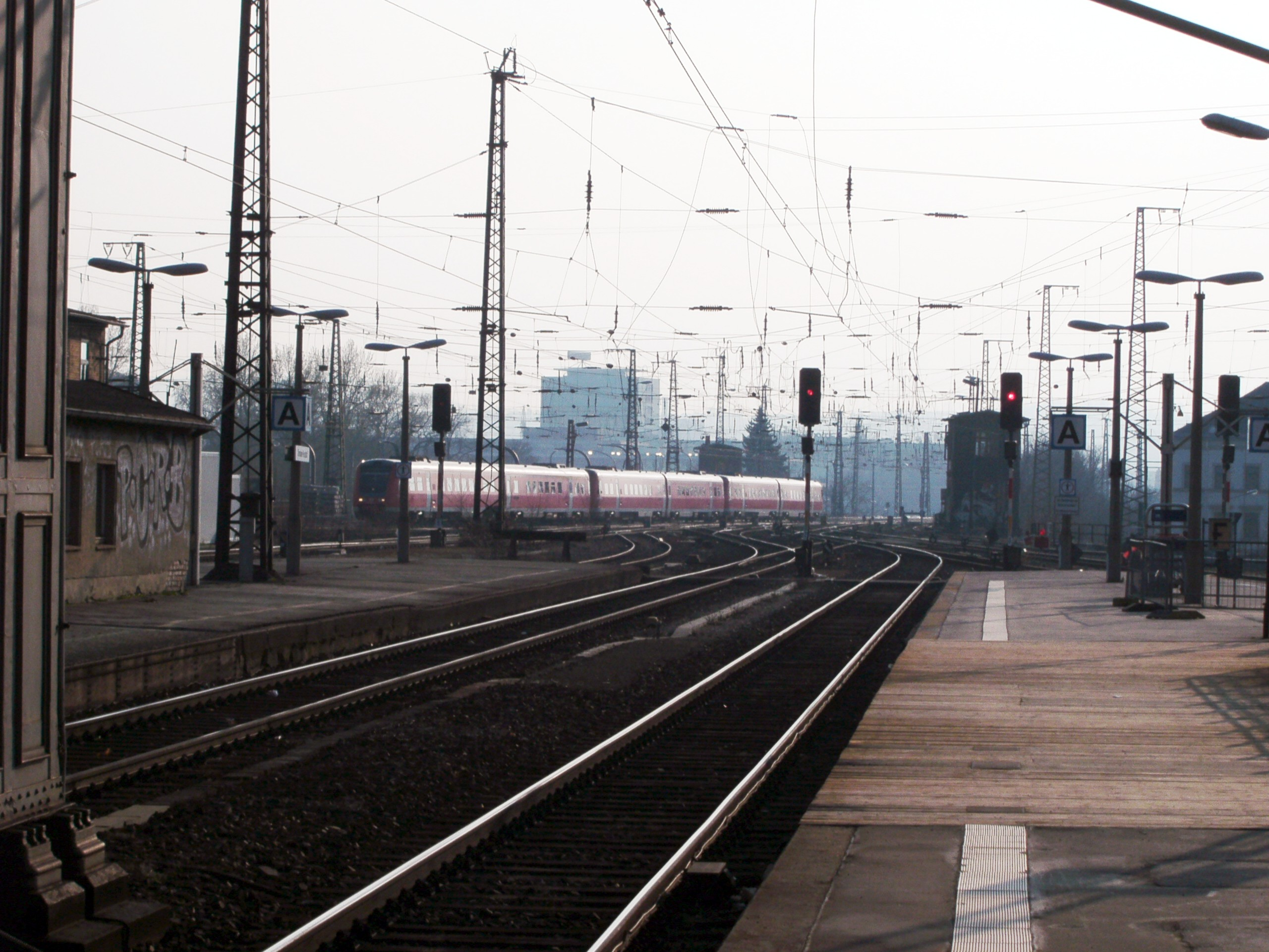 Das südliche Gleisvorfeld des Bahnhofs Dresden-Neustadt mit dem einfahrenden Regionalexpress Dresden-Görlitz.